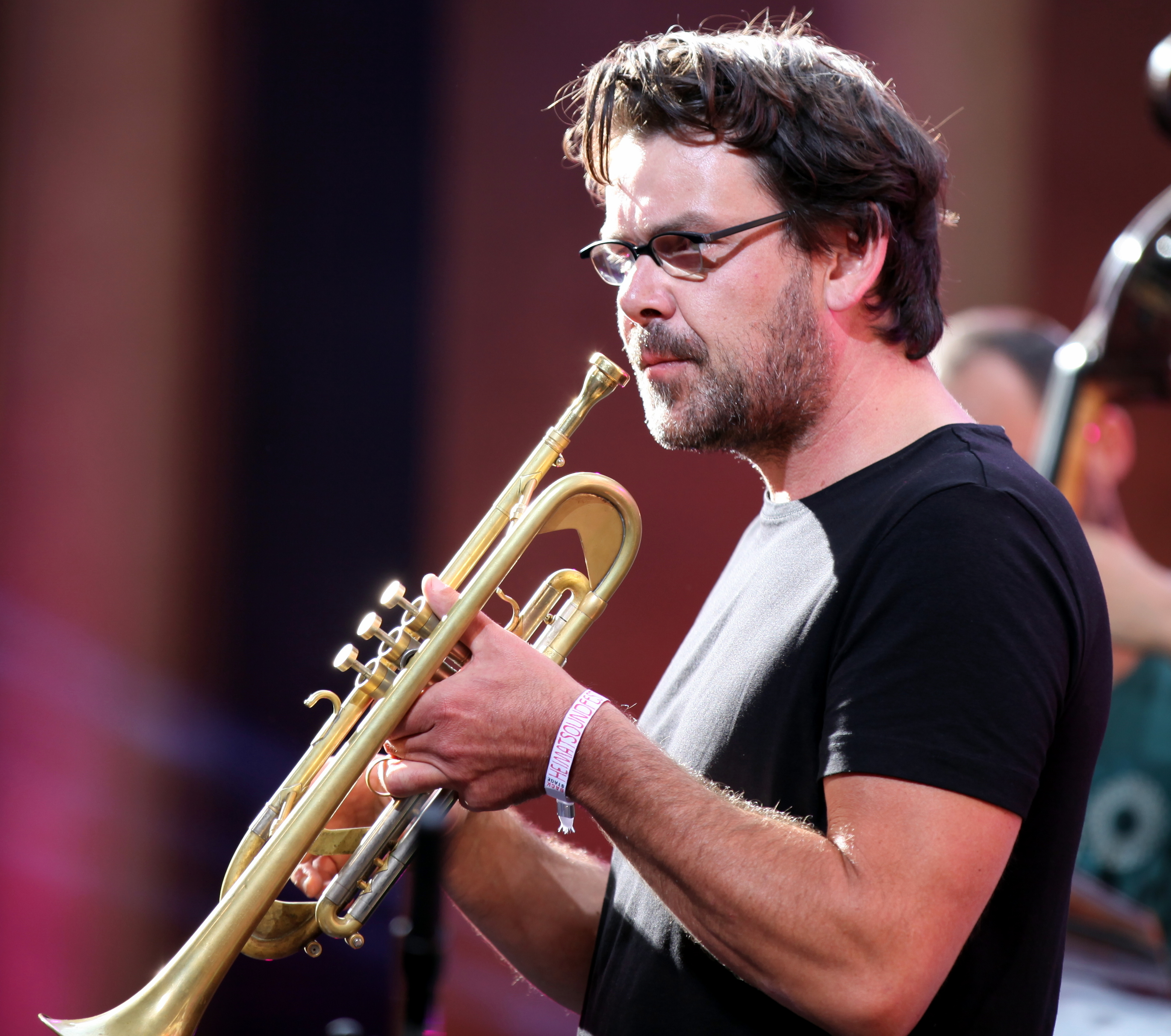 Alien Ensemble auf dem Heimatsound-Festival 2015 in Oberammgergau Micha Acher an der Trompete